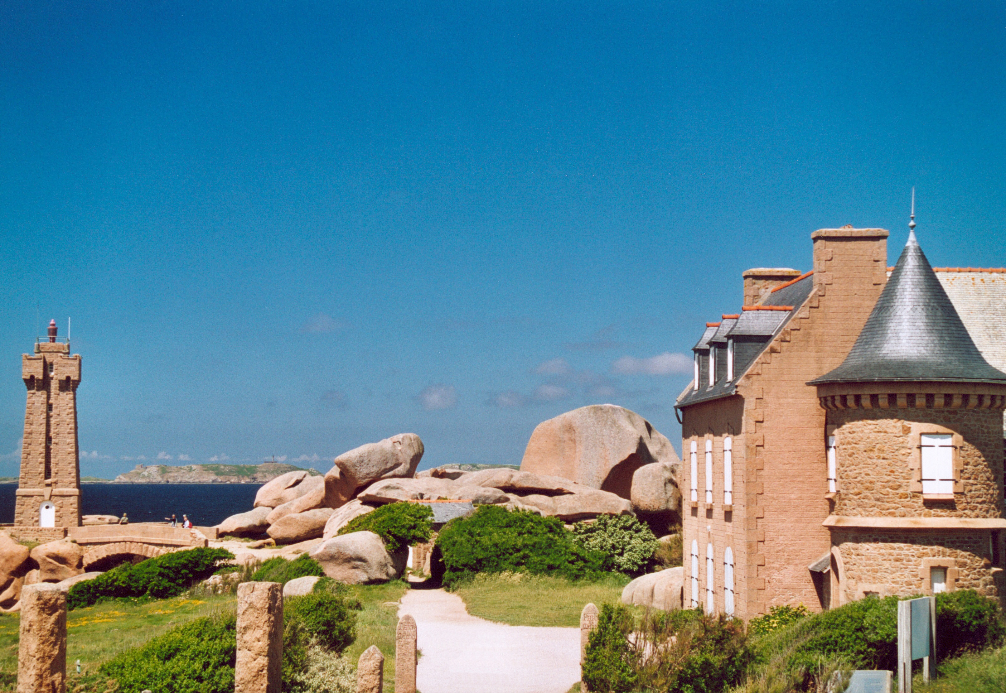 France Bretagne Côtes d'Armor Côte de granit rose Photographie prise par GIRAUD Patrick